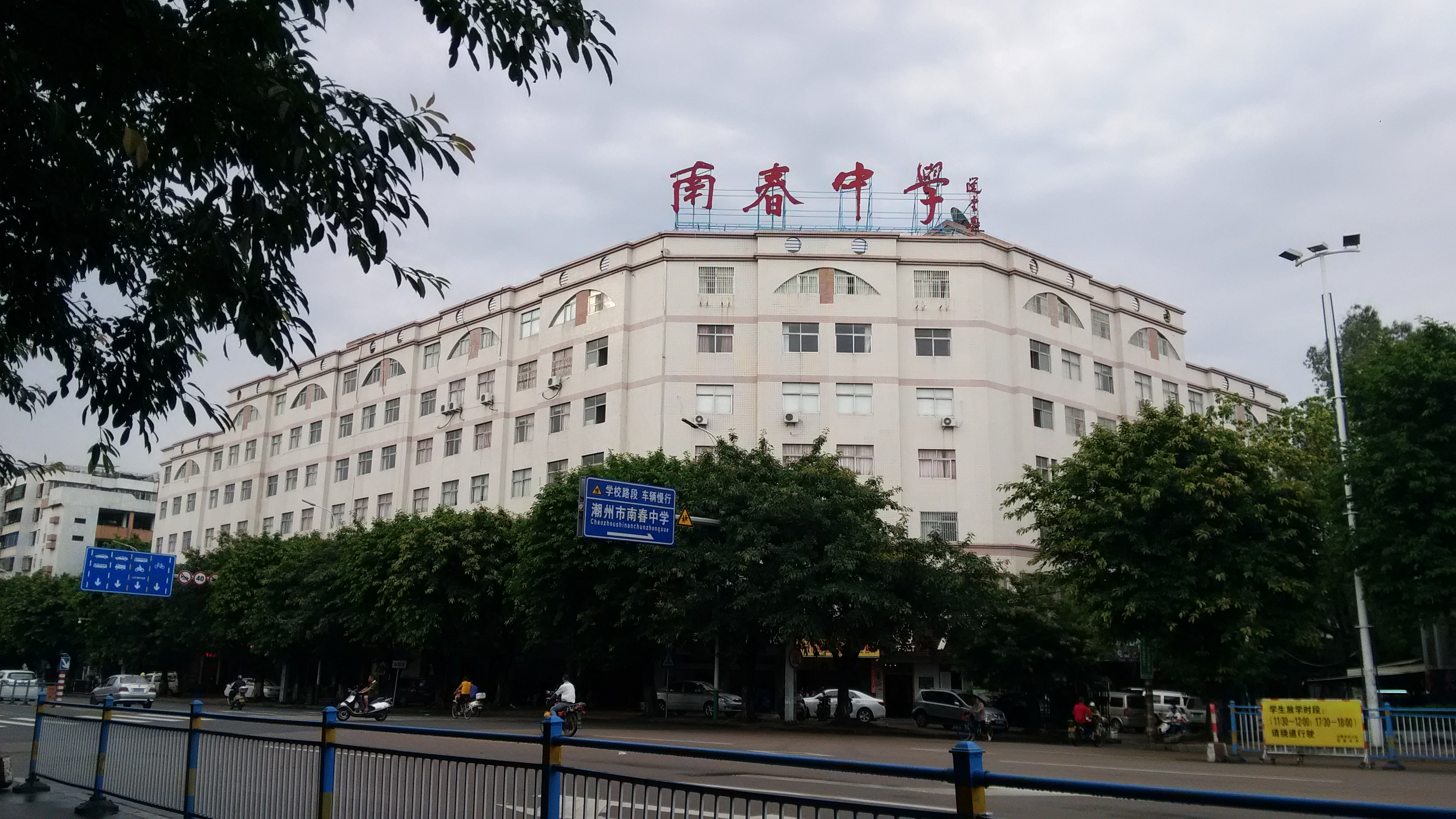 潮州市南春中学的科技楼，其楼顶为“南春中学”字样。